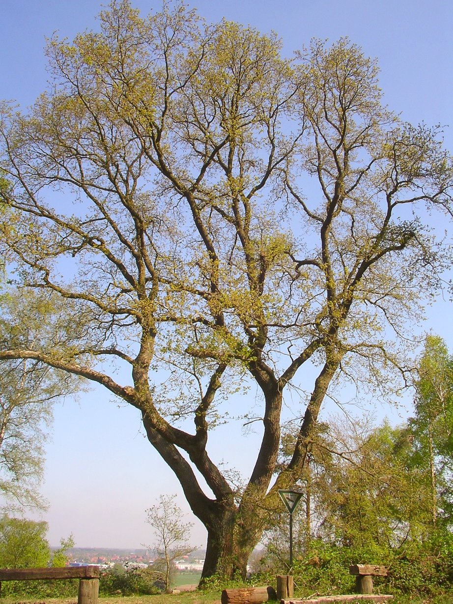 Naturdenkmal - alte Eiche auf dem Lünsberg (Die Berge), Velen, Kreis Borken